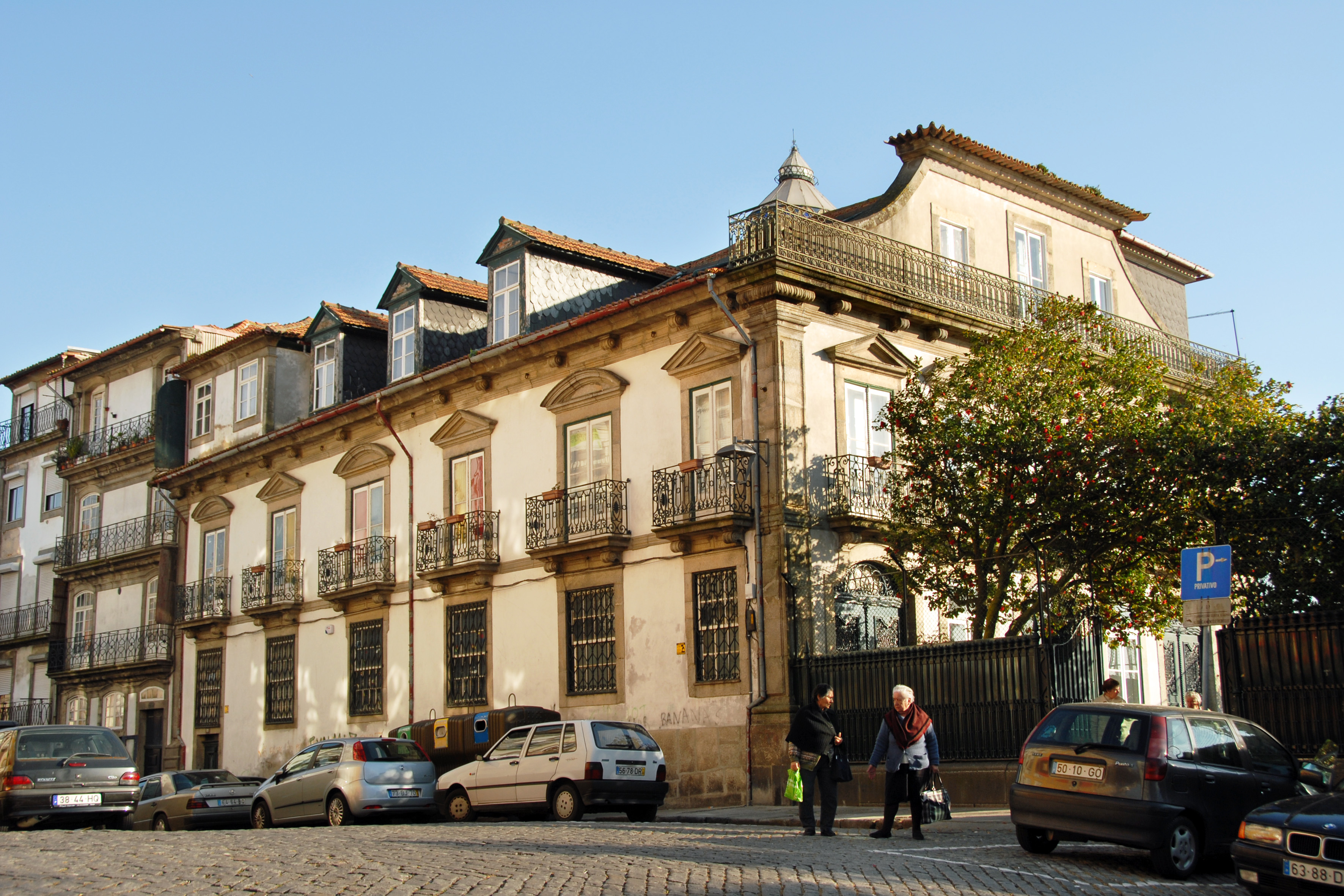 Antigo Clube dos Ingleses ou Oporto British Club ou Clube Inglês This file was uploaded for Wiki Loves Monuments in Portugal with the unique identifier 73121.